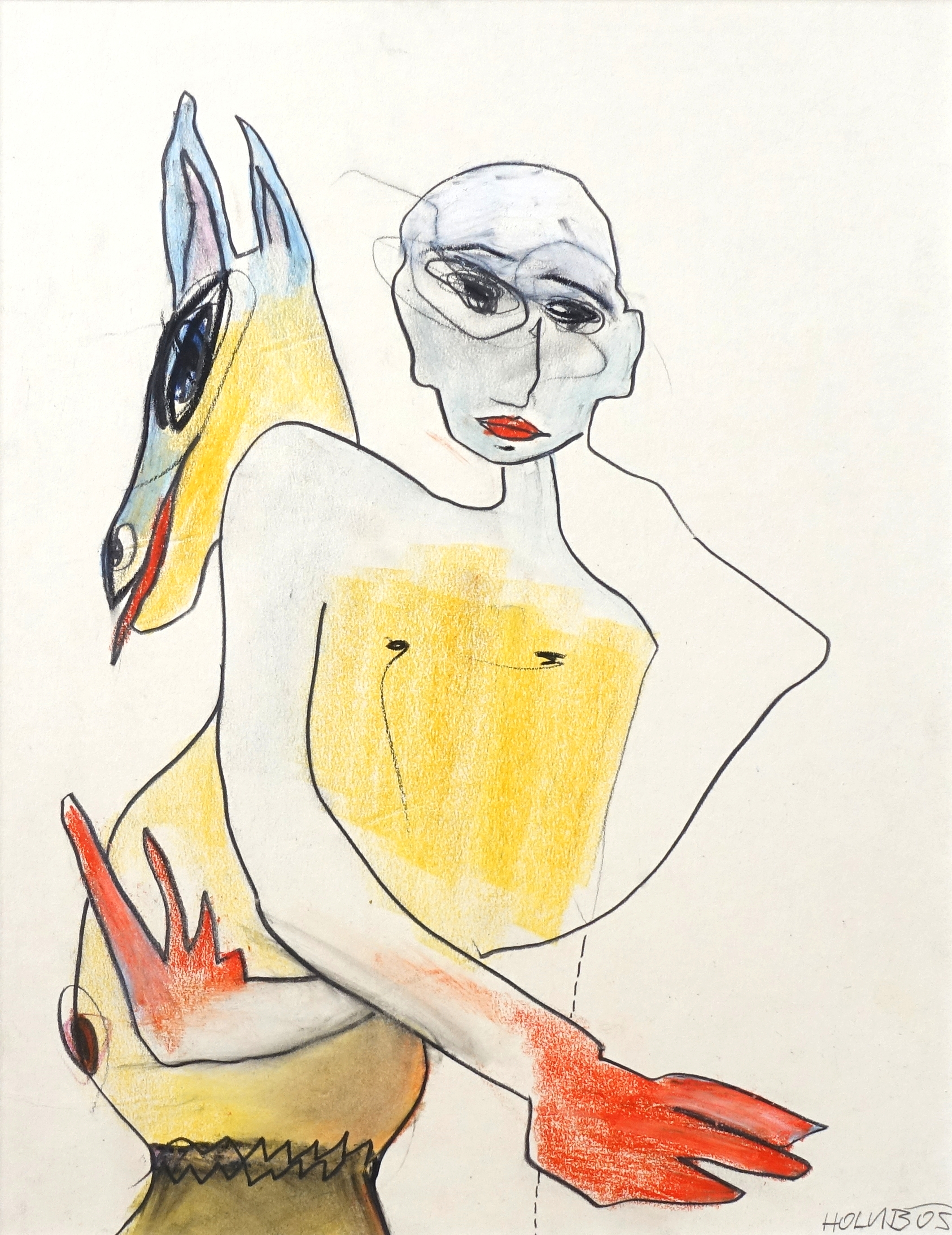 Oscar Holub: so (Mischtechnik auf Karton, 2005)